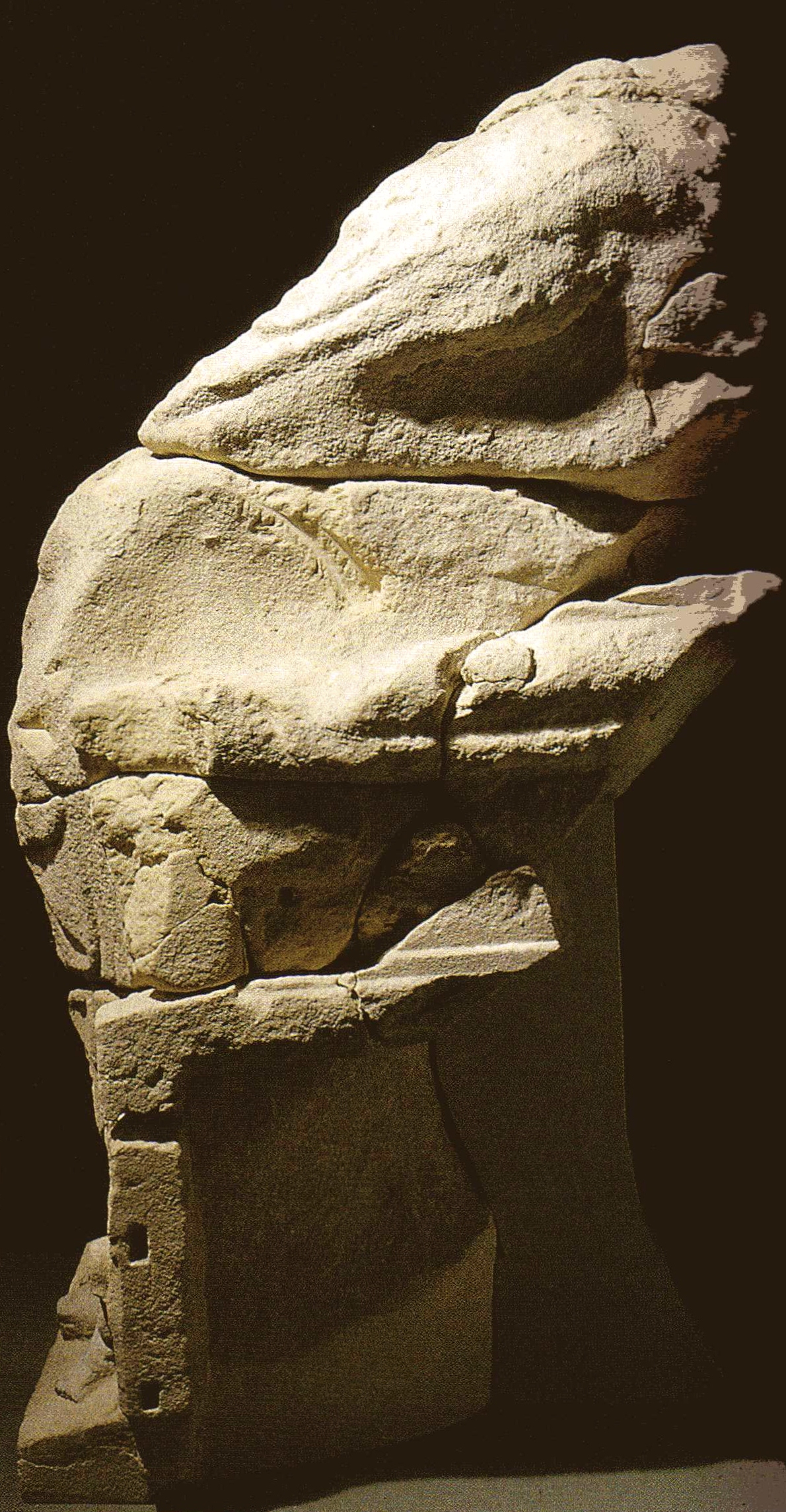 Dama Sedente. Sala VIII. Museo de Arte Ibérico El Cigarralejo.